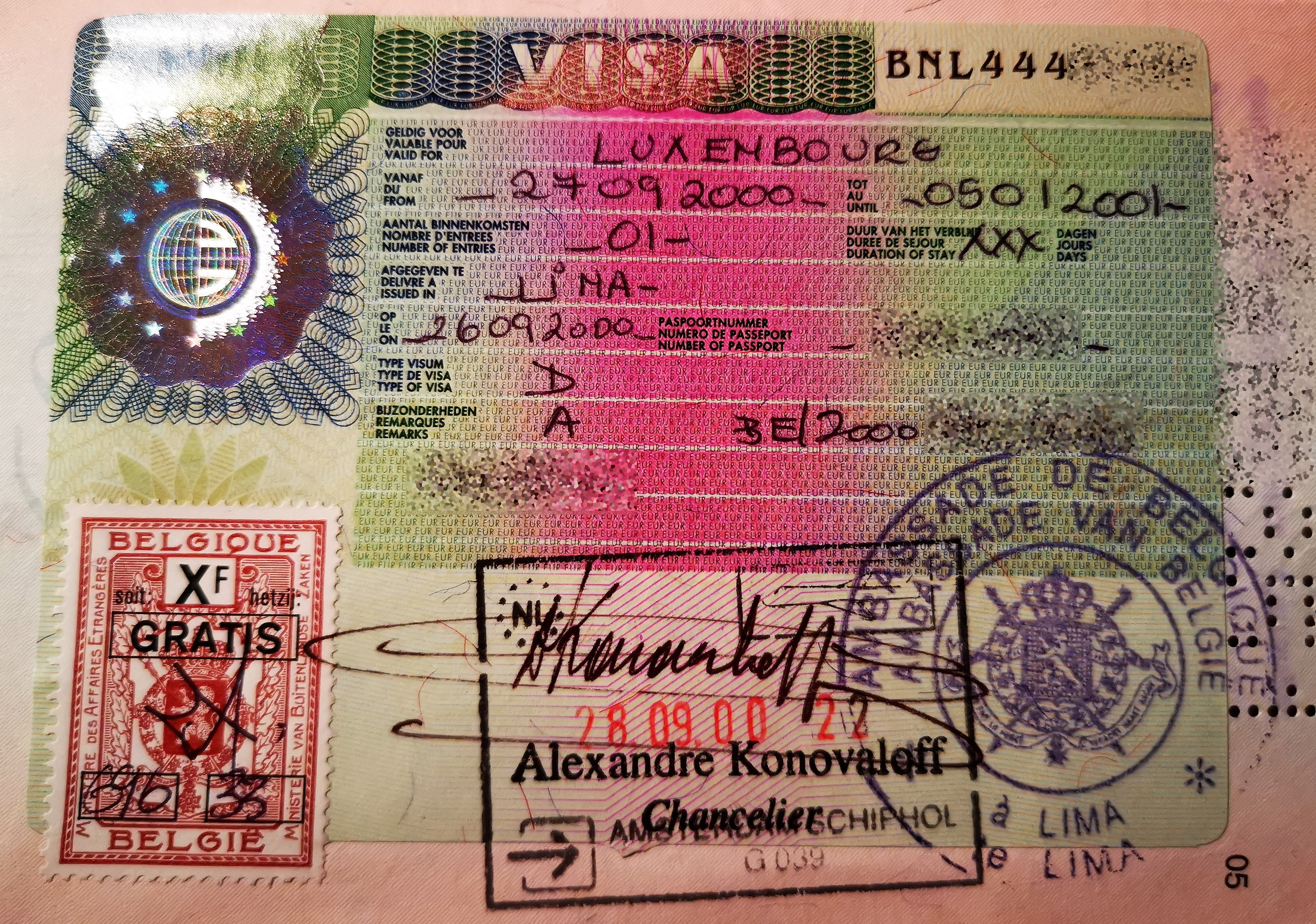 Visa pour le Grand-Duché de Luxembourg, émis par l'ambasse de Belgique à Lima (Pérou) en l'an 2000